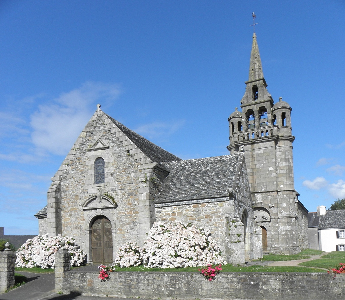 Façade occidentale de l'église Saint-Pierre de Guimaëc (29).